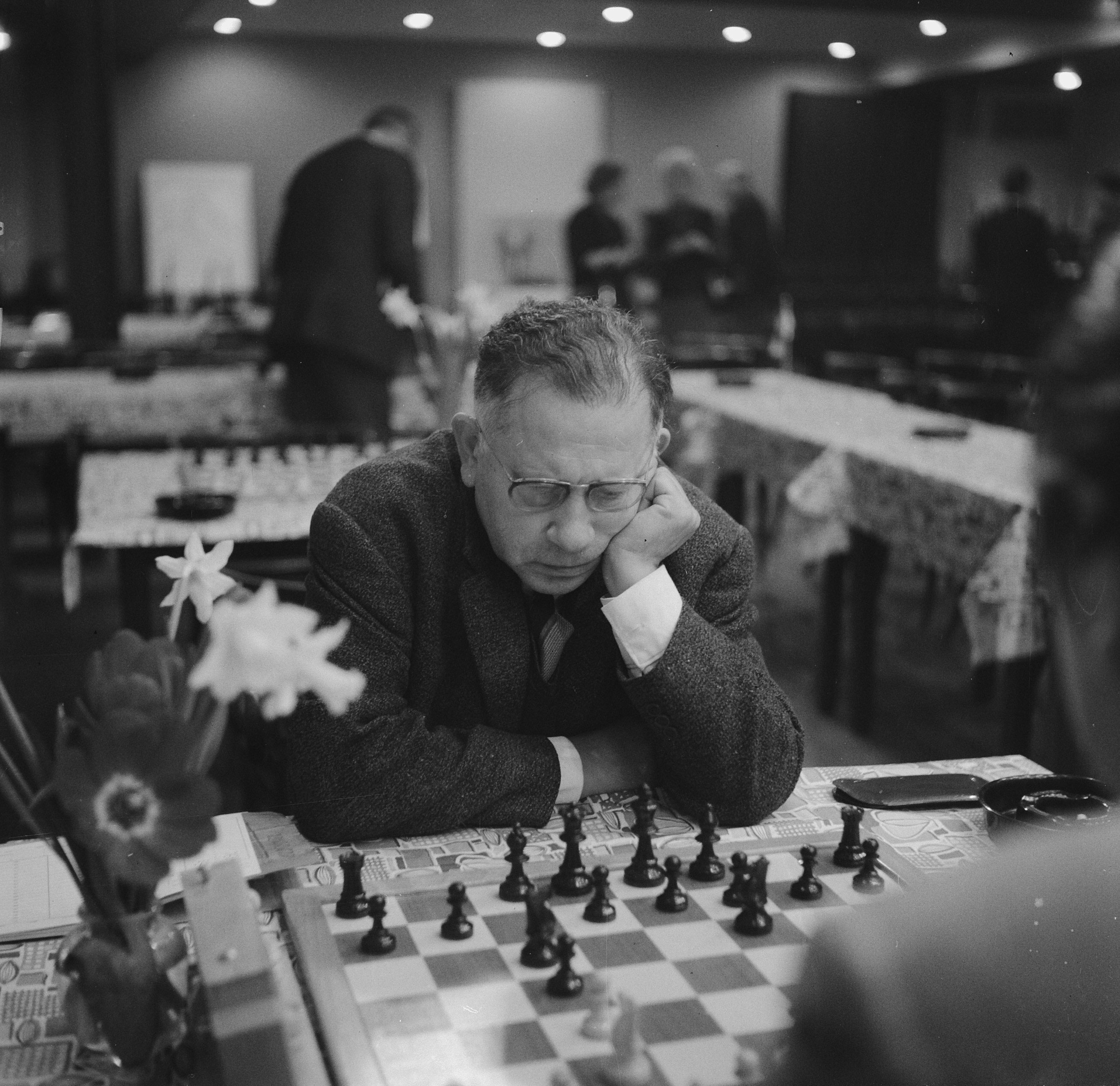 Collectie / Archief : Fotocollectie Anefo Reportage / Serie : [ onbekend ] Beschrijving : 26e Hoogovenschaaktoernooi te Beverwijk, A. Dunkelblum (Belgie) Datum : 8 januari 1964 Locatie : België, Beverwijk Trefwoorden : schaken Persoonsnaam : A. Dunkelblum Instellingsnaam : Hoogovenschaaktournooi Fotograaf : Nijs, Jac. de / Anefo Auteursrechthebbende : Nationaal Archief Materiaalsoort : Negatief (zwart/wit) Nummer archiefinventaris : bekijk toegang 2.24.01.03 Bestanddeelnummer : 915-9242